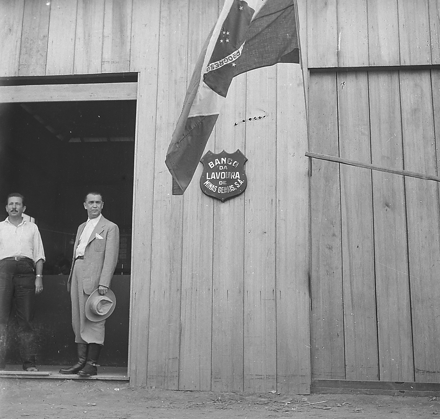 Imagem do Fundo Agência Nacional, do Arquivo Nacional